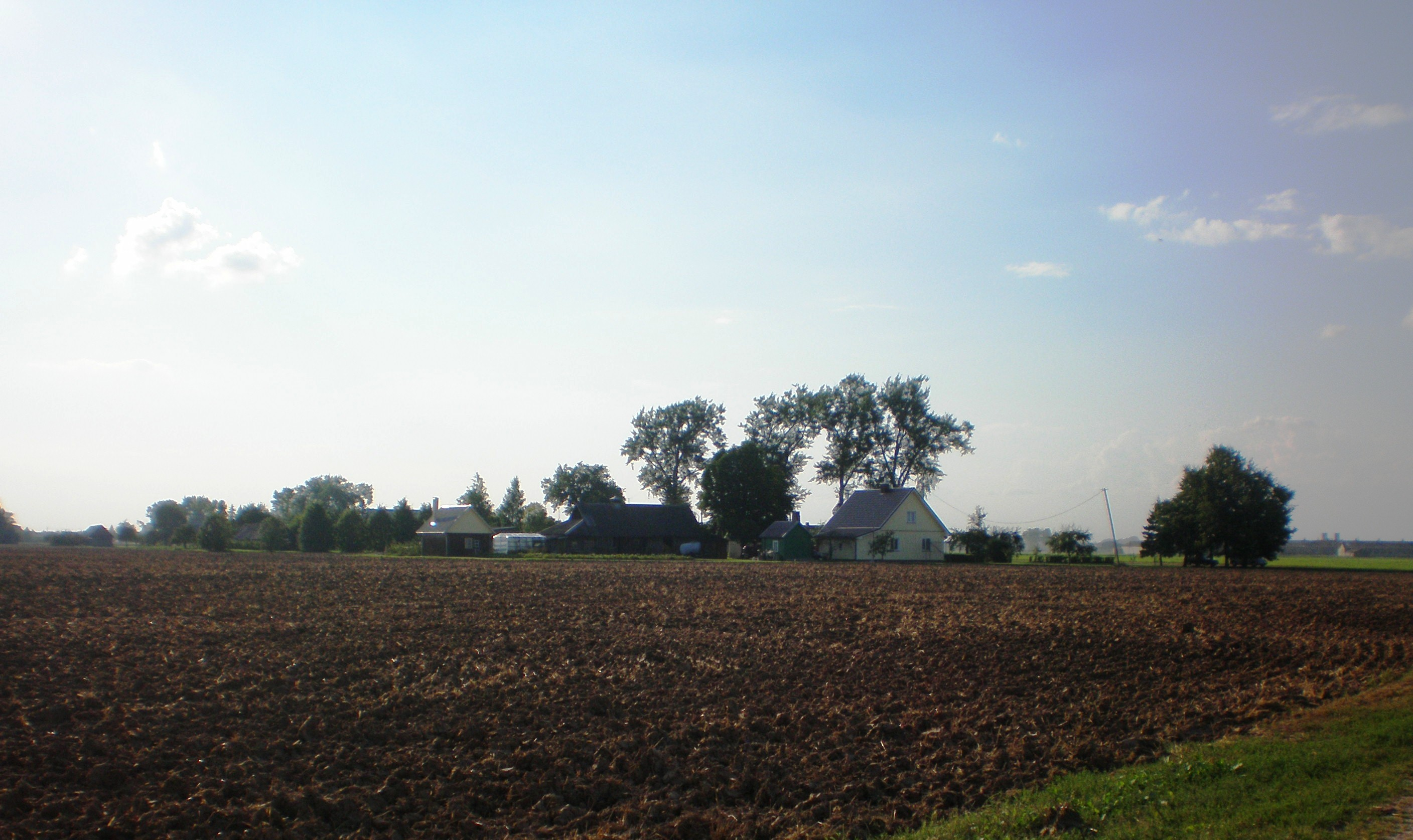 Ansainiai, Kėdainių raj.